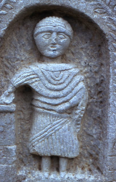 Ruines romaines de Timgad, Algérie